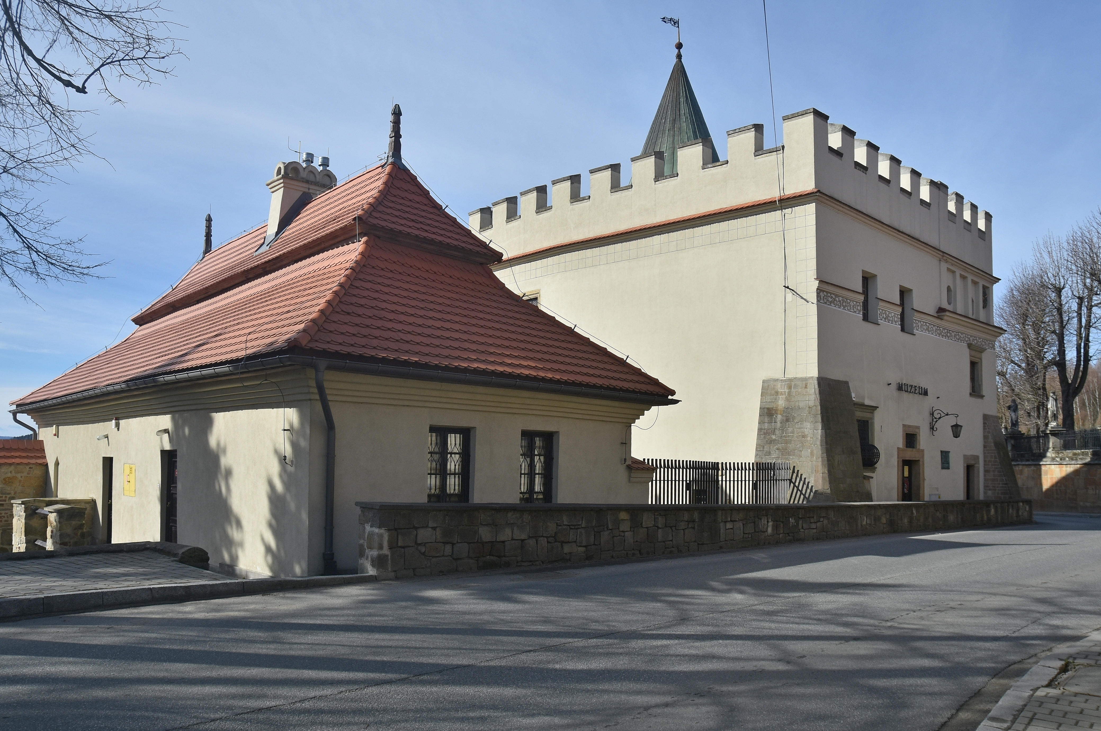 Biecz, Dom, XV/XVI